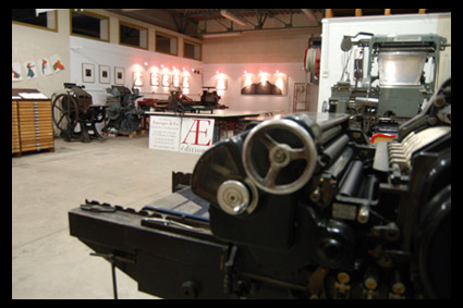 local des éditions Æncrages & Co